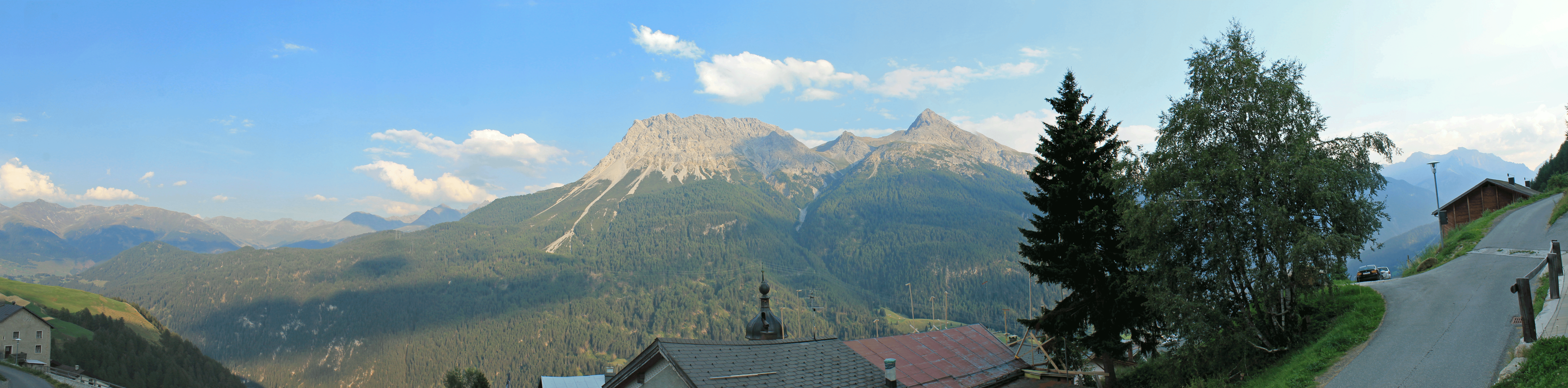 Vue sur les montagnes en face de Tschlin